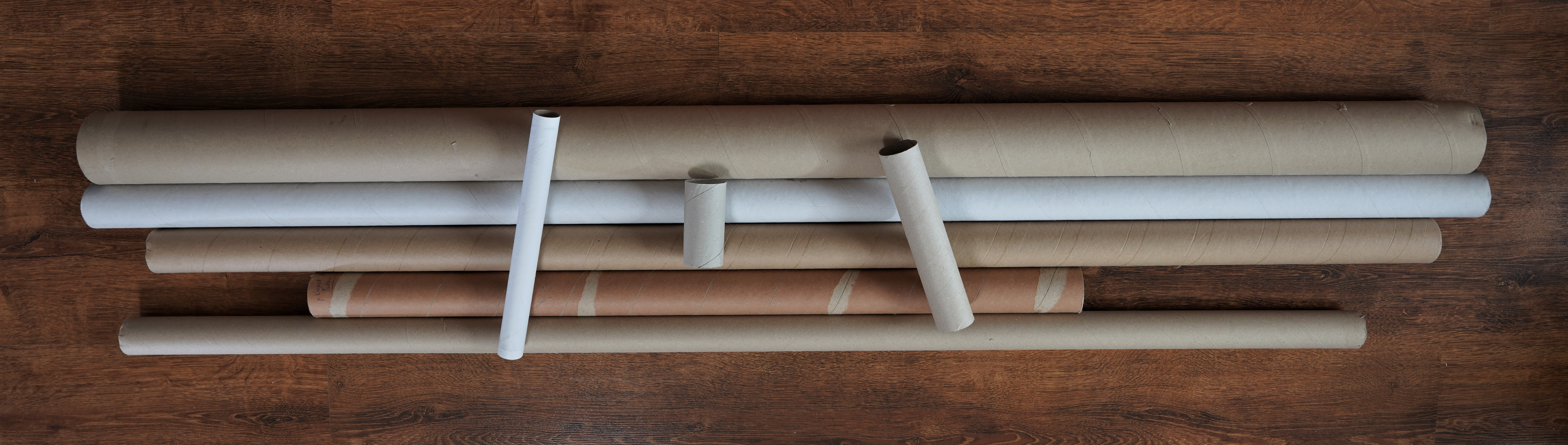 Gliz Gliza